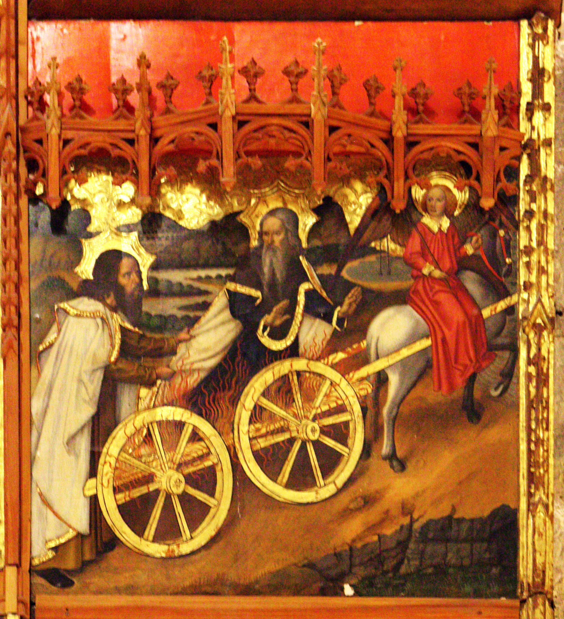 Taula de l'Ascensió d'Elies amb el Carro de Foc del “Retaule de la transfiguració” de Jaume Huguet a la sala de l´antic refectori dels canonges, de la catedral de Tortosa. La seva ubicació original era a la capella central de la girola, darrera l'altar major.